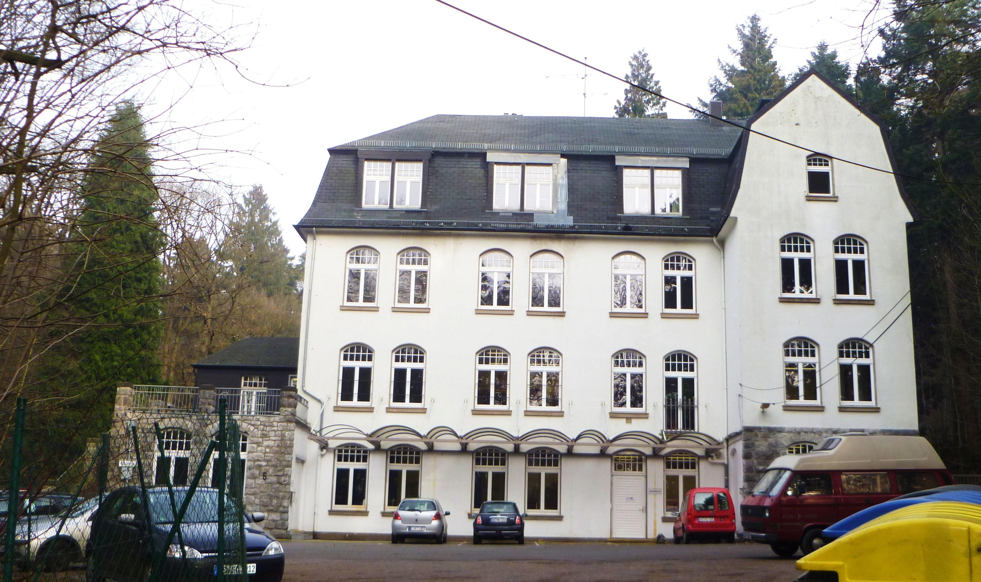 Baudenkmal in Aachen-Mitte, Schulgebäude der Jugendberufshilfe, Preußwald